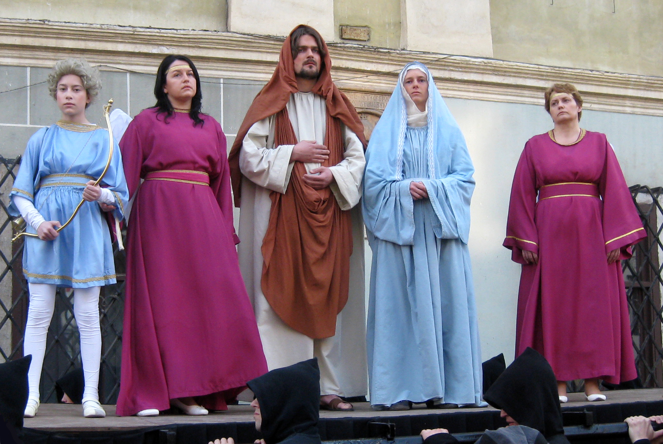 Škofjeloški pasijon (Processio Locopolitana), izvedba 2009 v Škofji Loki